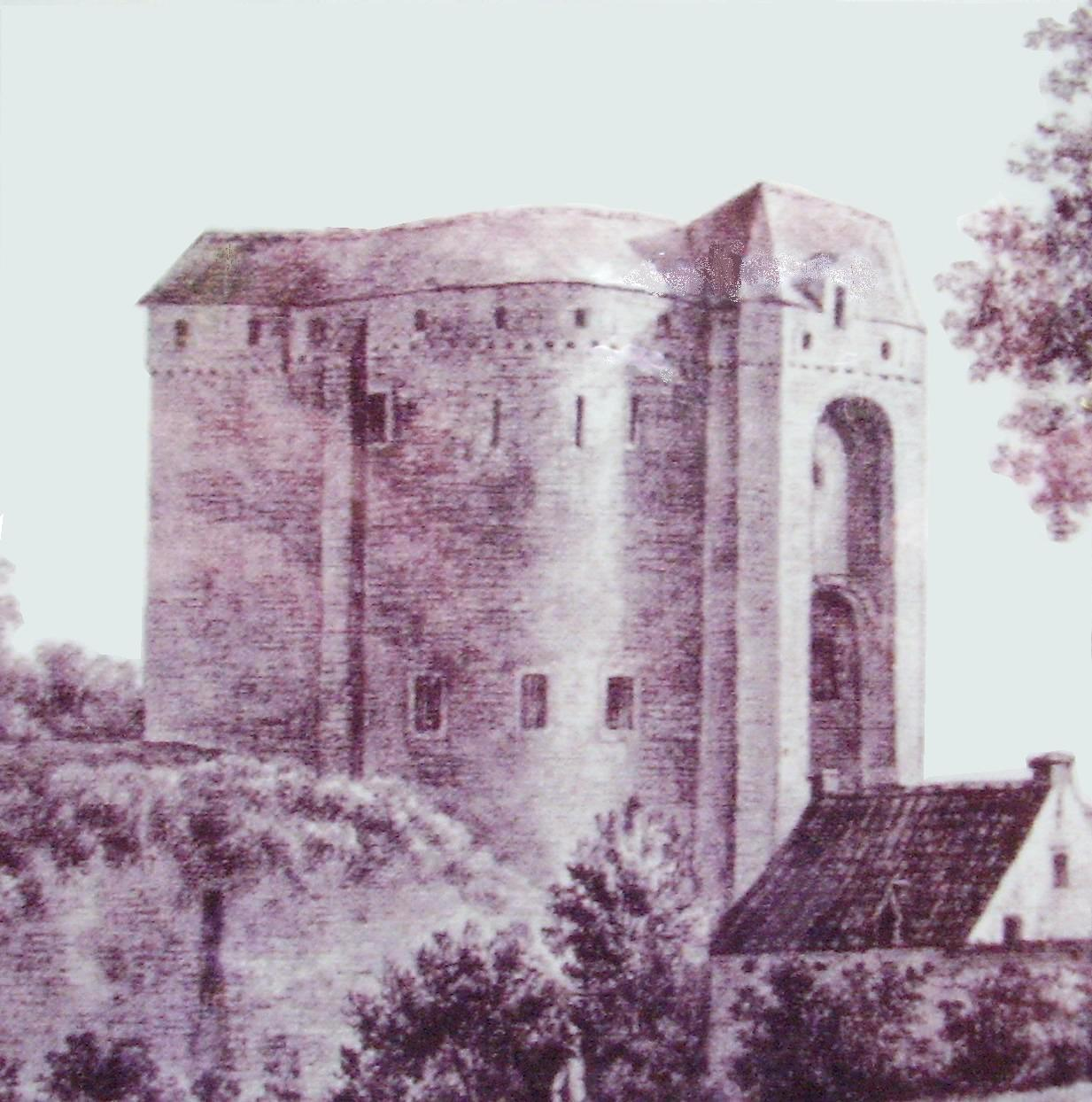 Porte de Hal, seconde enceinte de Bruxelles - (détail) dessin de Paul Vitzthumb